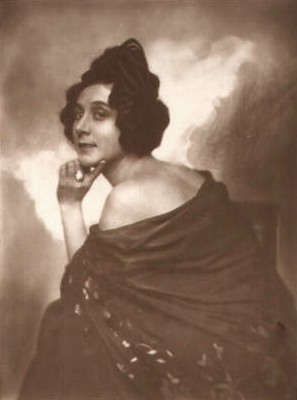 Portrait der österr. Schauspielerin Therese Ressel Orla.